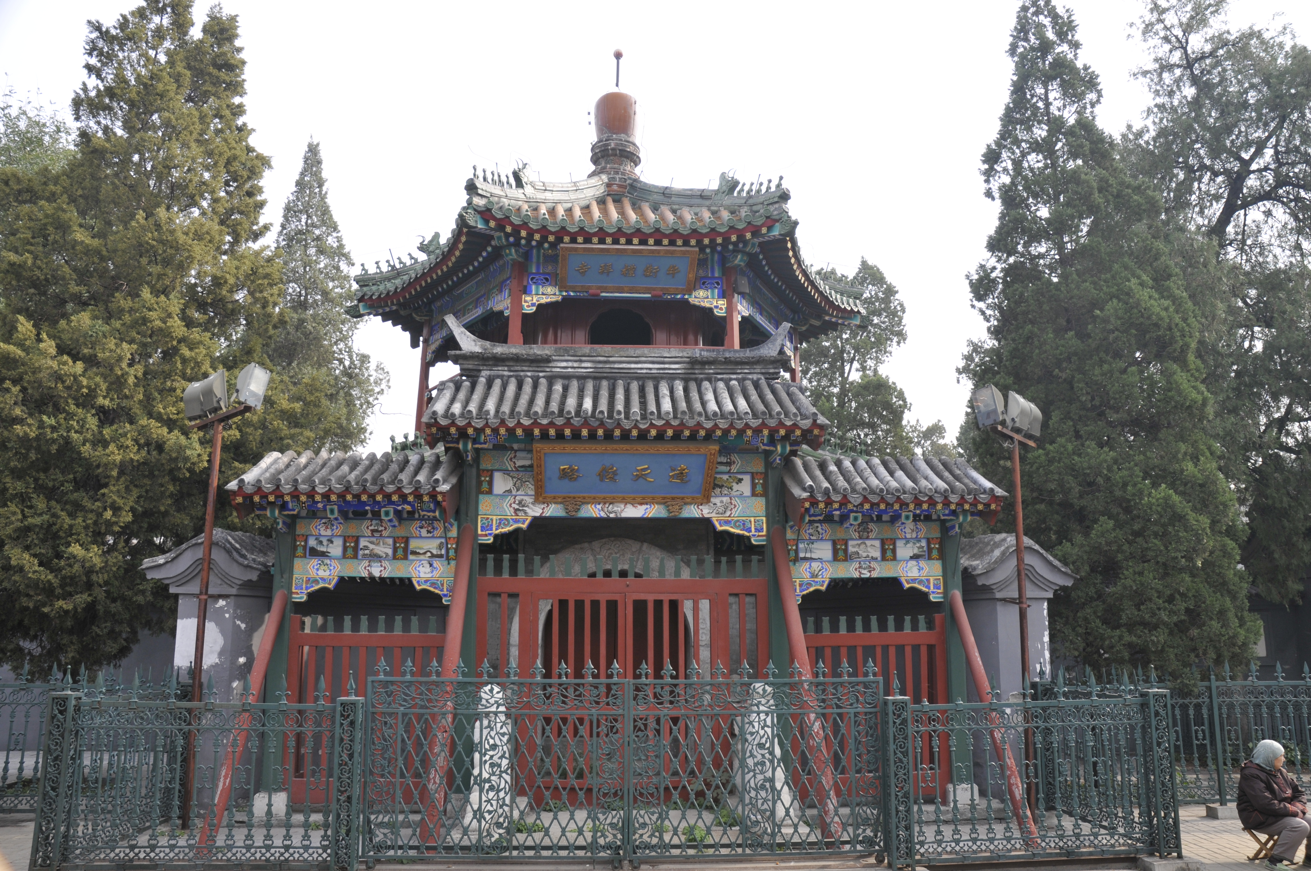 始建于辽代的伊斯兰教礼拜寺